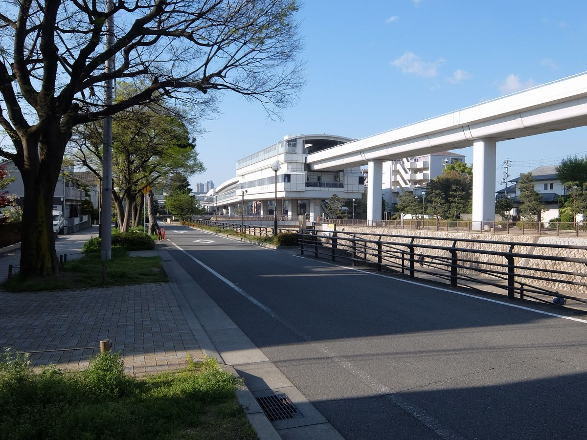 神戸市東灘区魚崎中町四丁目付近、住吉川河畔を北から南へ撮影。中央に六甲ライナー魚崎駅。